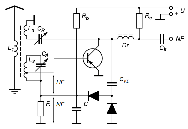 Reflexschaltung als Transistoraudion bezeichnet